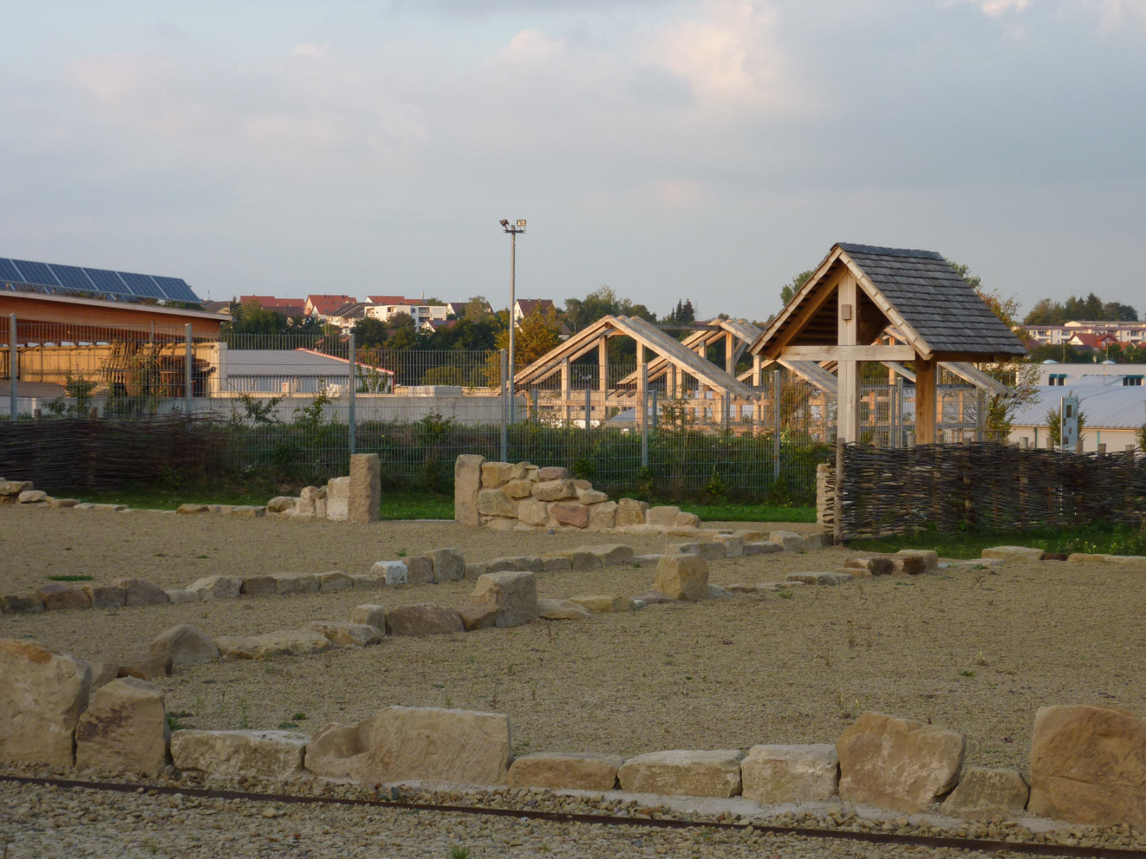 Freilichtmuseum Güglingen, römische Häuser